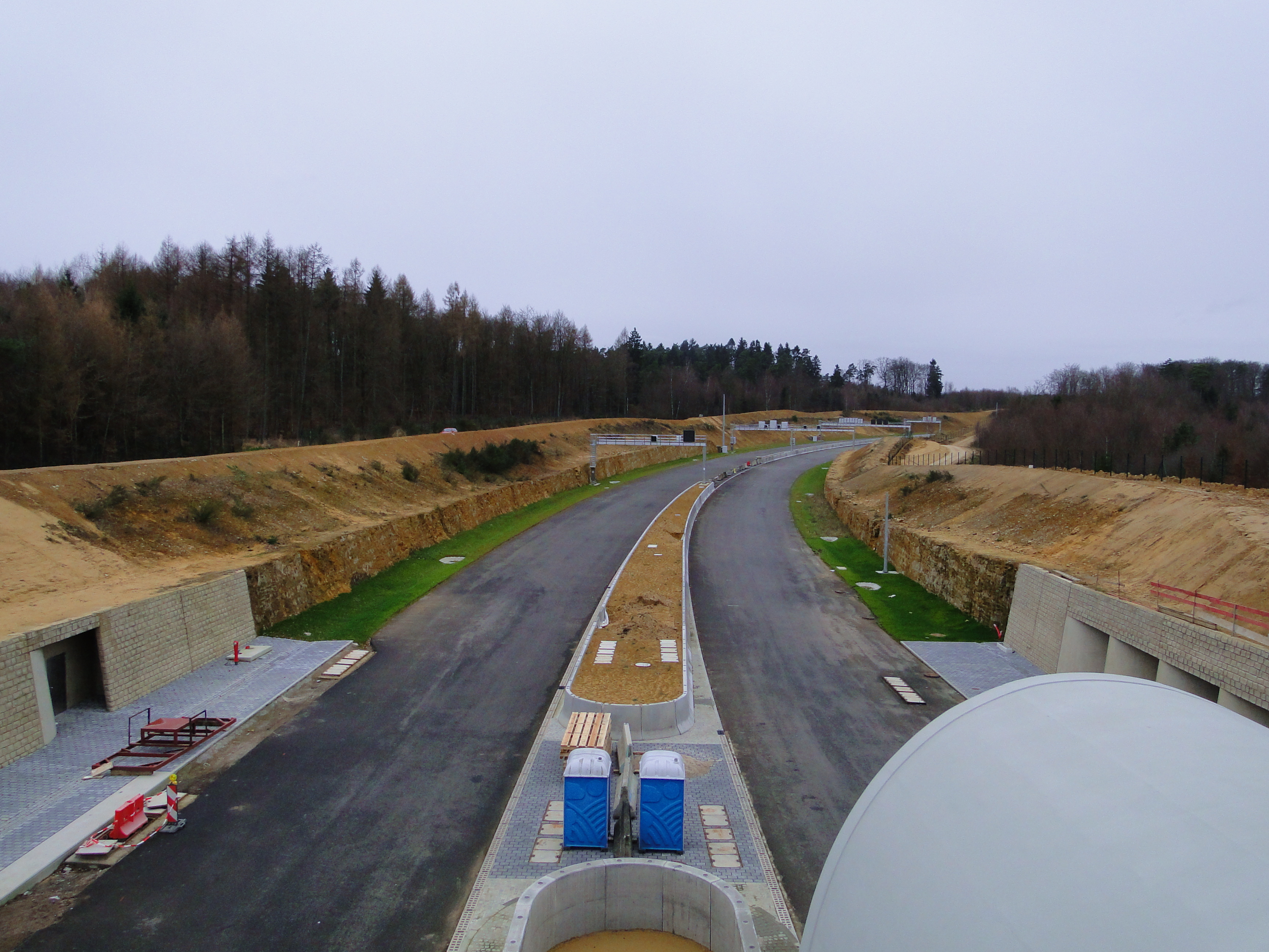 Schantjen A7 - Um Heeschdrëferbierg, Ausgank vum Tunnel Stafelter, a Richtung Norde gekuckt